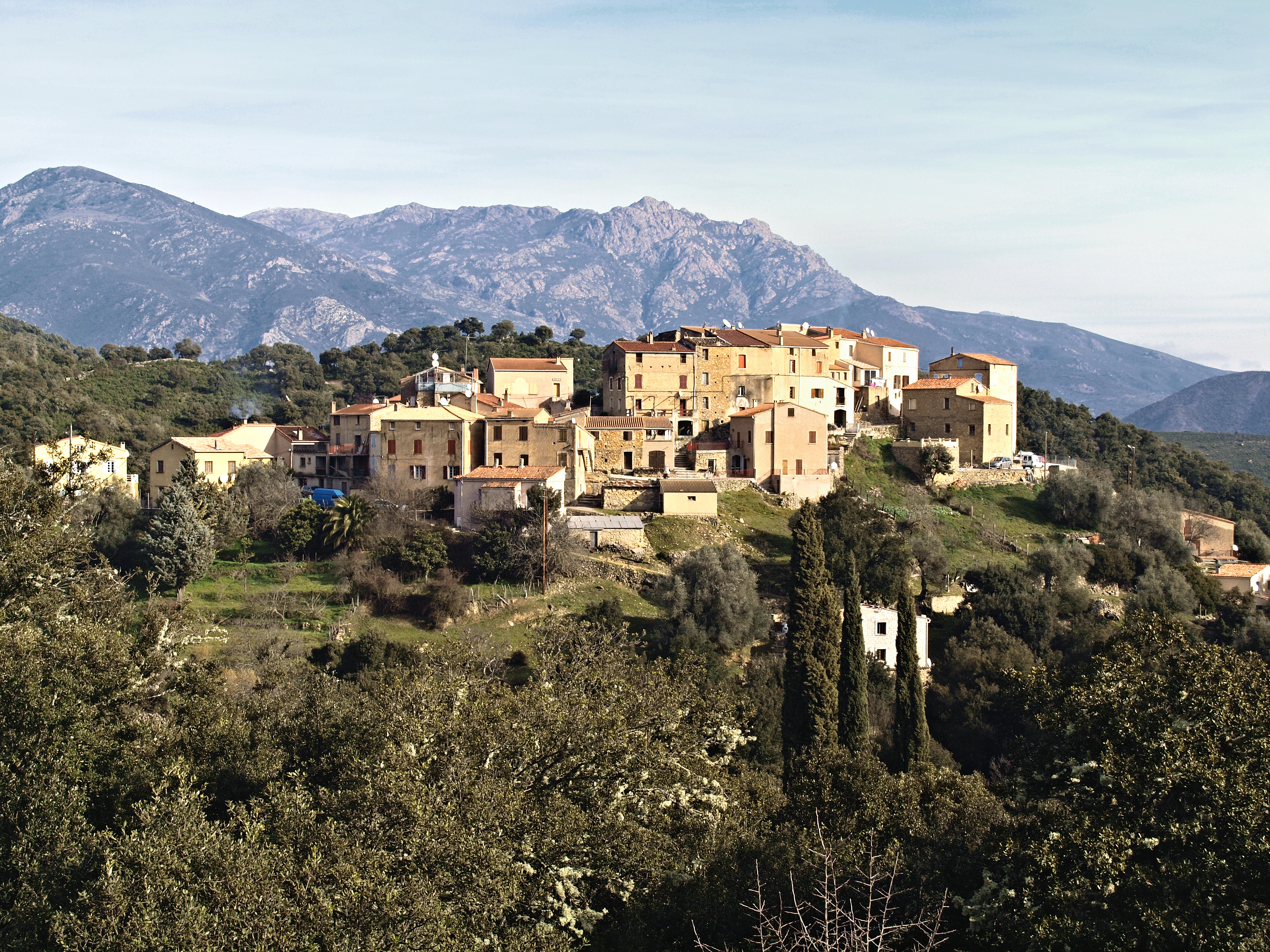 Piedigriggio (Corsica) - Le village